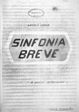 Composicion 1